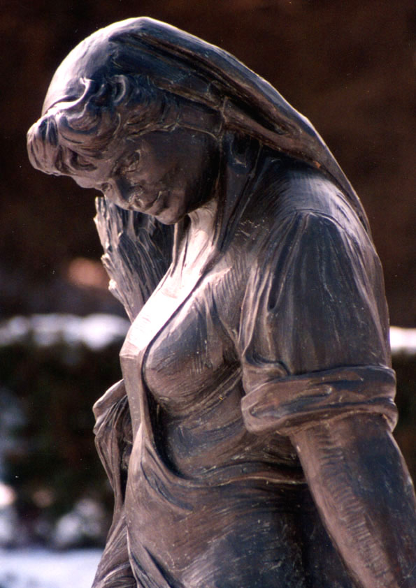 Kornbinderin, Detail-Aufnahme einer überlebensgroßen Bronze von Bildhauer Carsten Eggers in Deinste